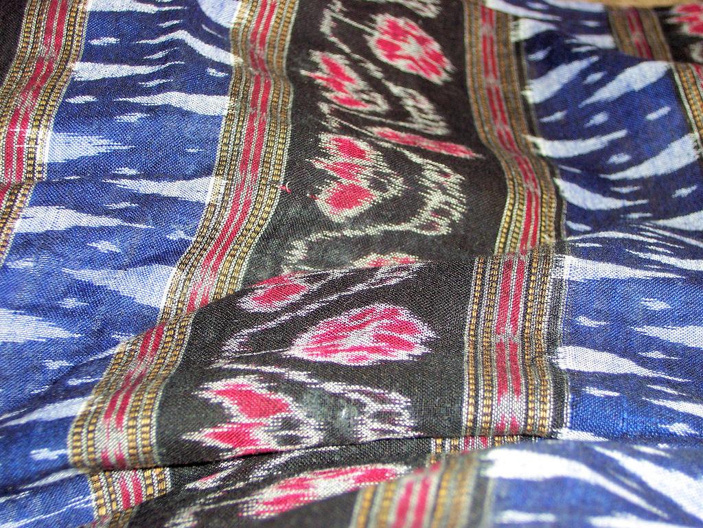 A Sambalpuri Handloomed Sari